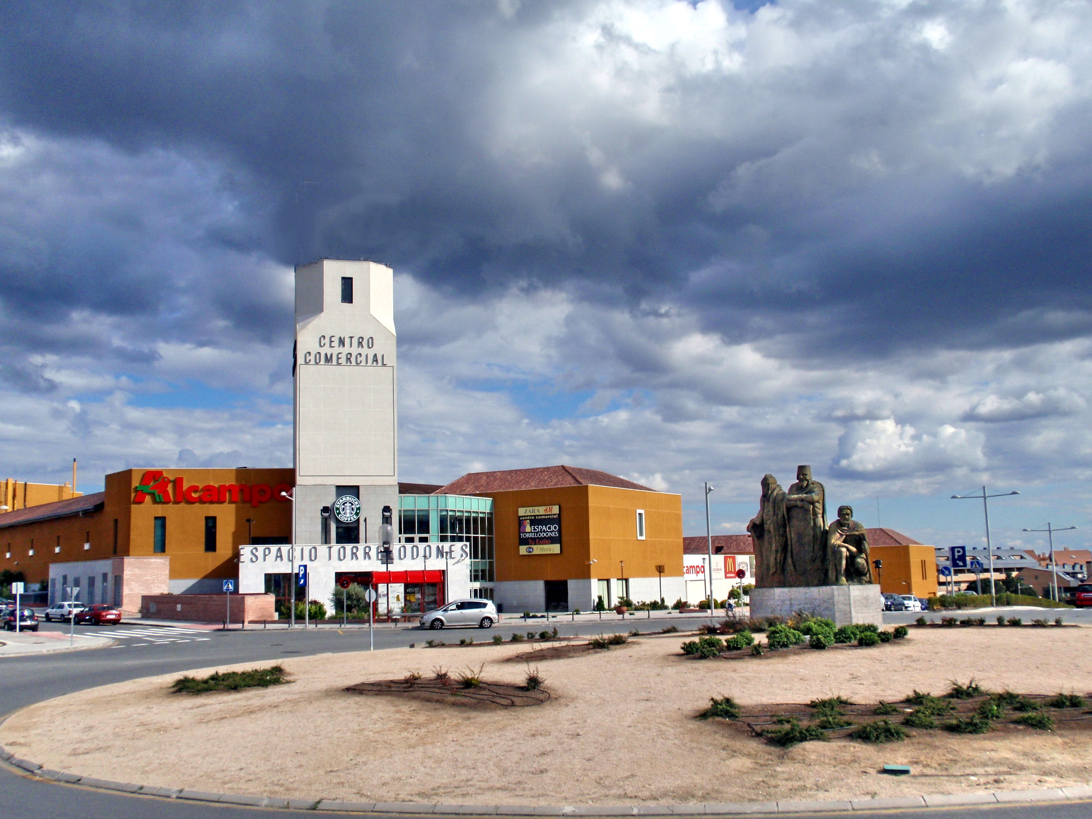 Torrelodones. Centro Comercial Espacio Torrelodones y Monumento 8º Centenerio.